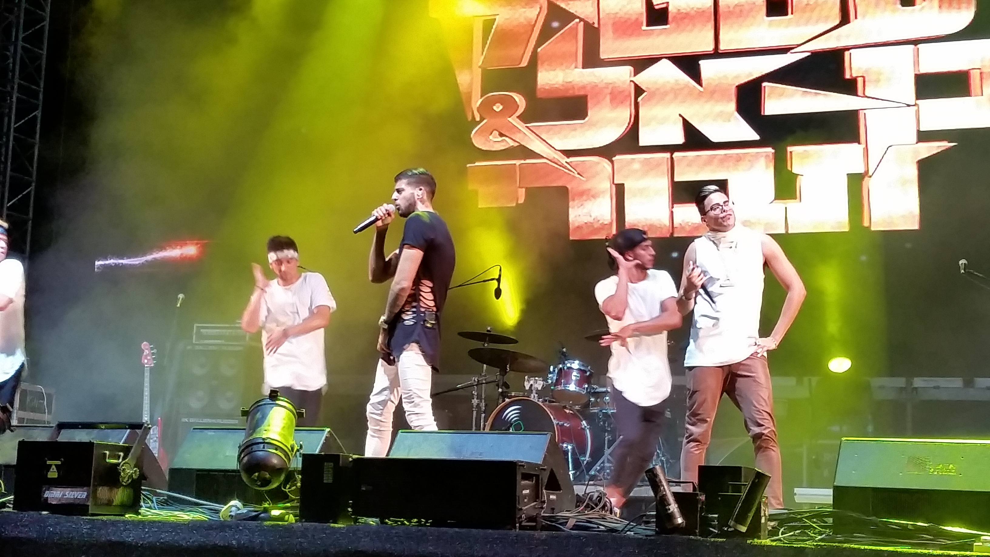 סטטיק ובן-אל בהופעה בחיפה, מאי 2017